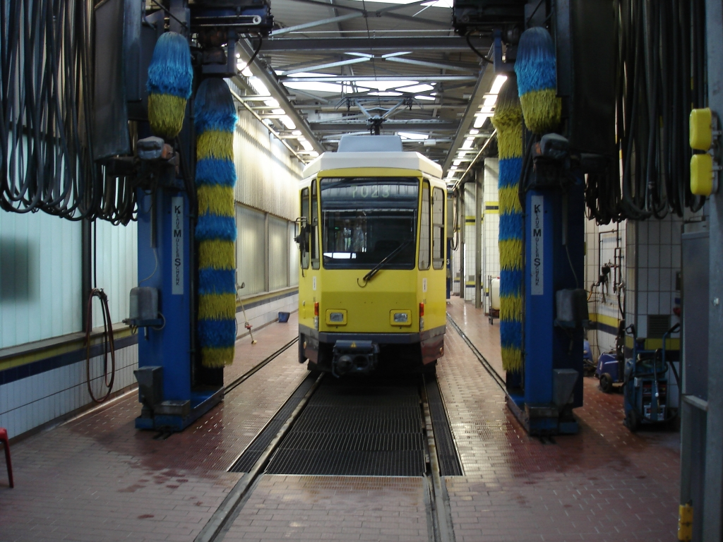 Tramwaschtag